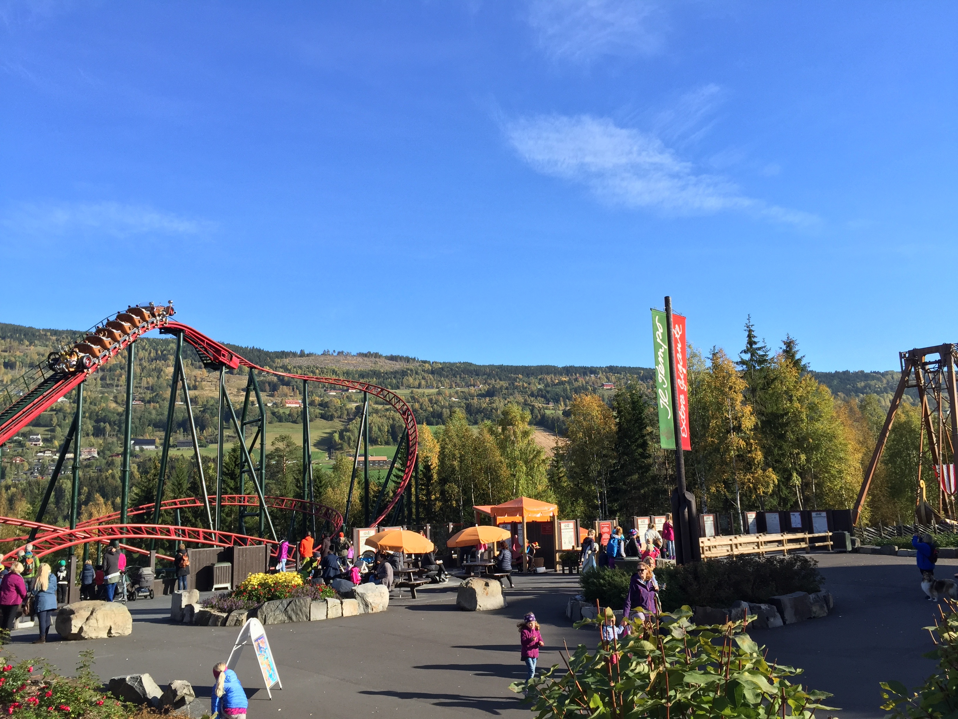 Il Tempo Extra Gigante ble åpnet i 2013